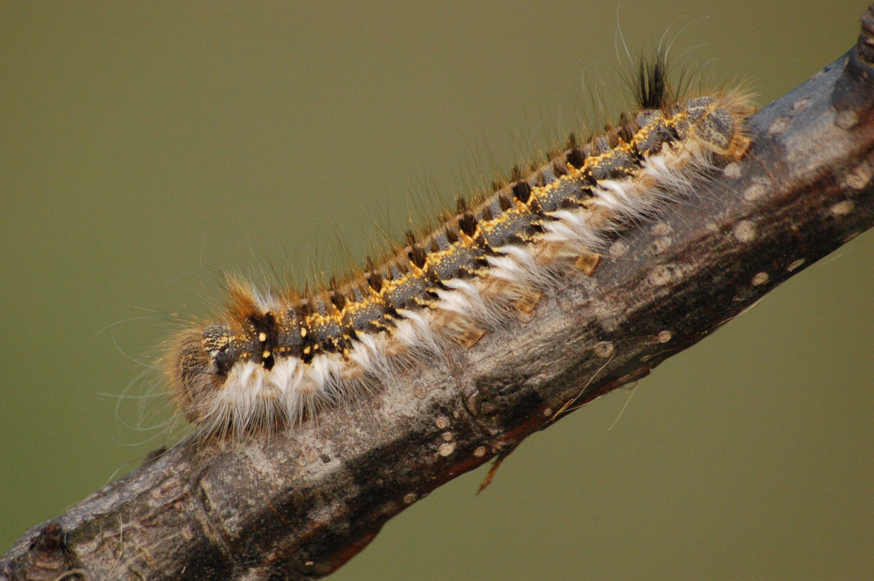 Euthrix potatoria (Larve)